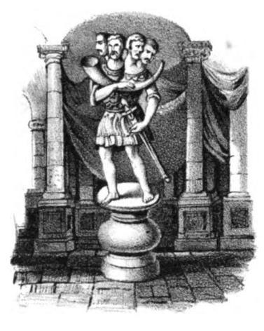 Svantevit